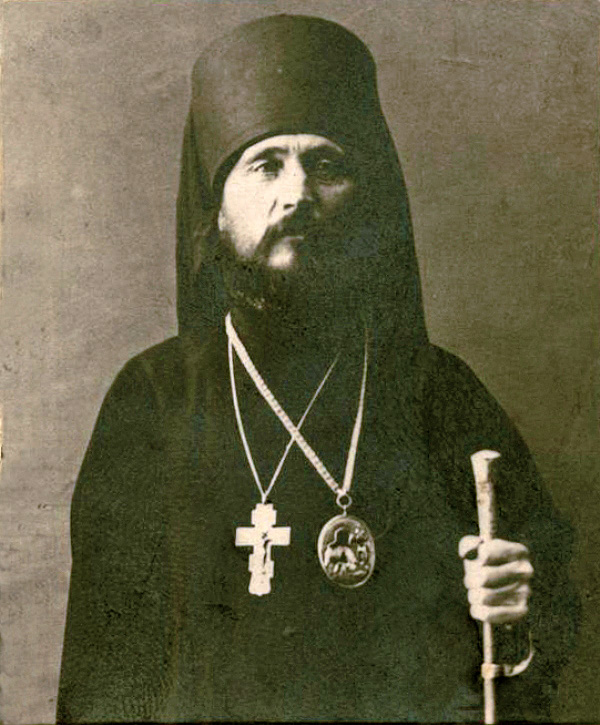 Епископ Герман (Коккель) в облачении